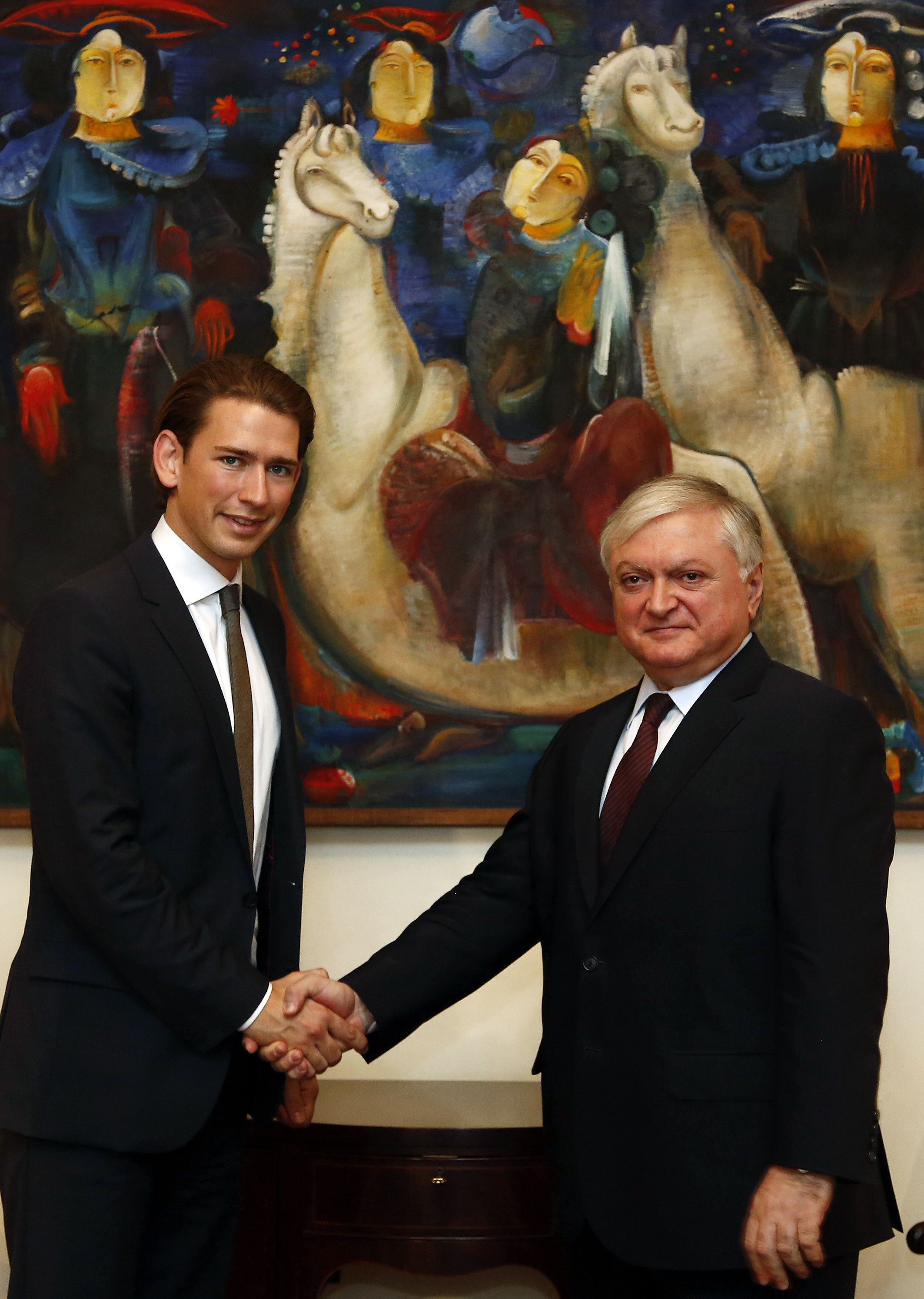 Arbeitsbesuch Armenien. Bundesminister Sebastian Kurz trifft den armenischen Außenminister Edward Nalbandian. Jerewan, 08.05.2014, Foto: Dragan Tatic